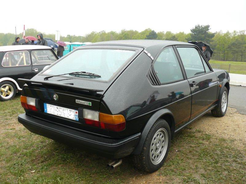 Photo prise à Montlhlery en avril 2012